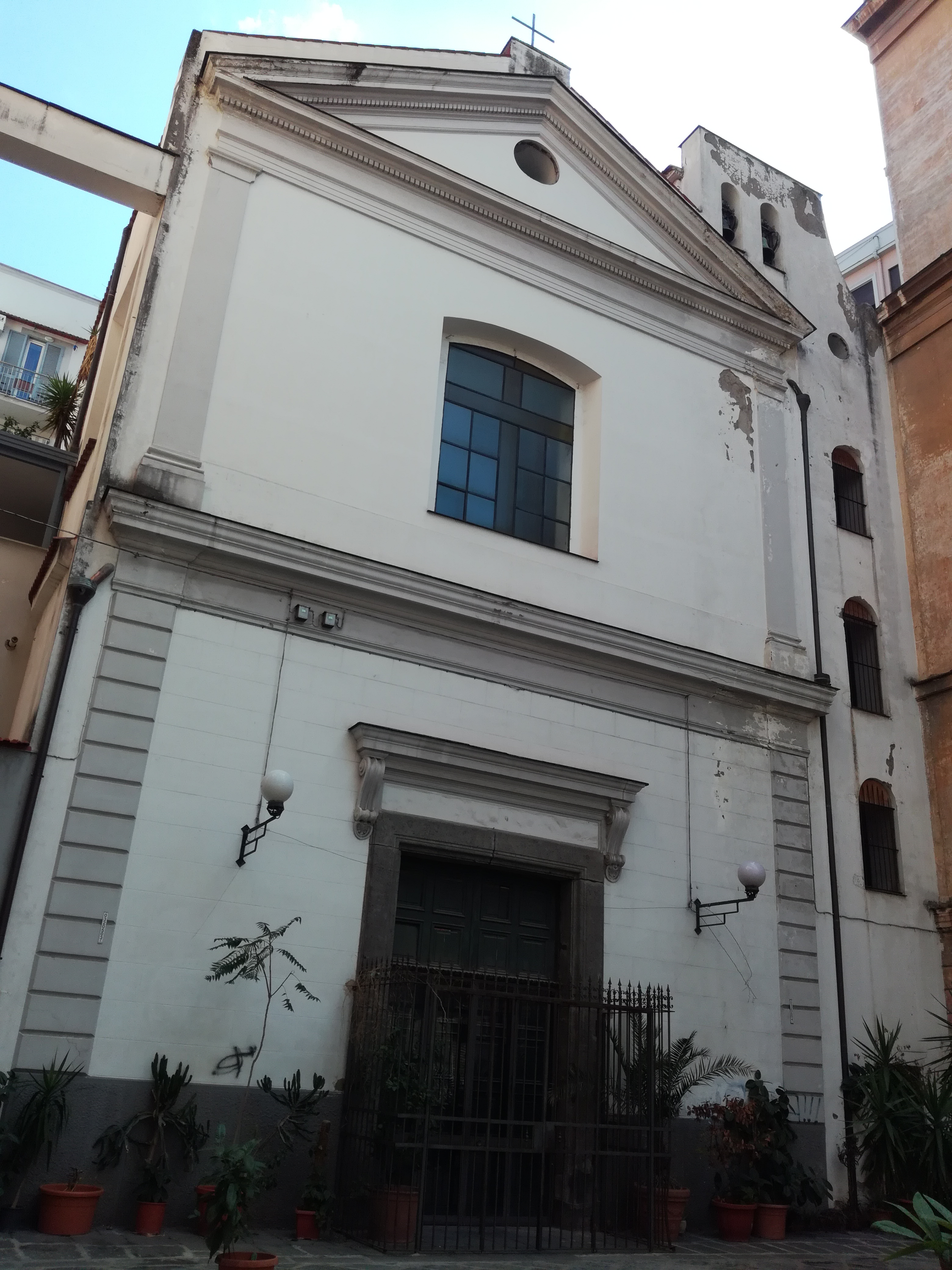 Facciata della Chiesa di Sant'Onofrio dei Vecchi (Napoli)